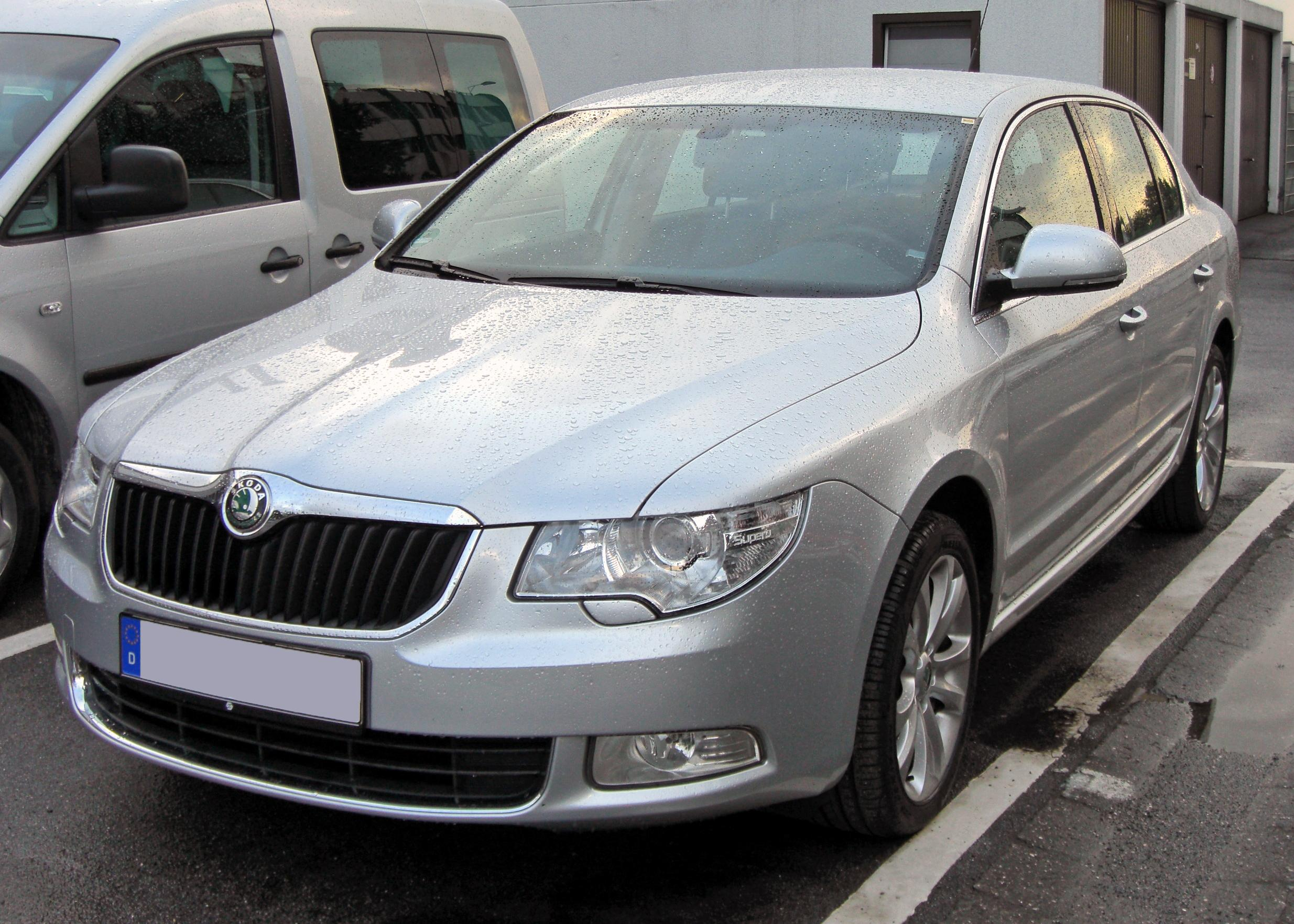 Skoda Superb II